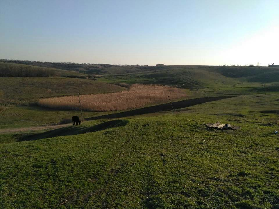 Весна в селе Никольском